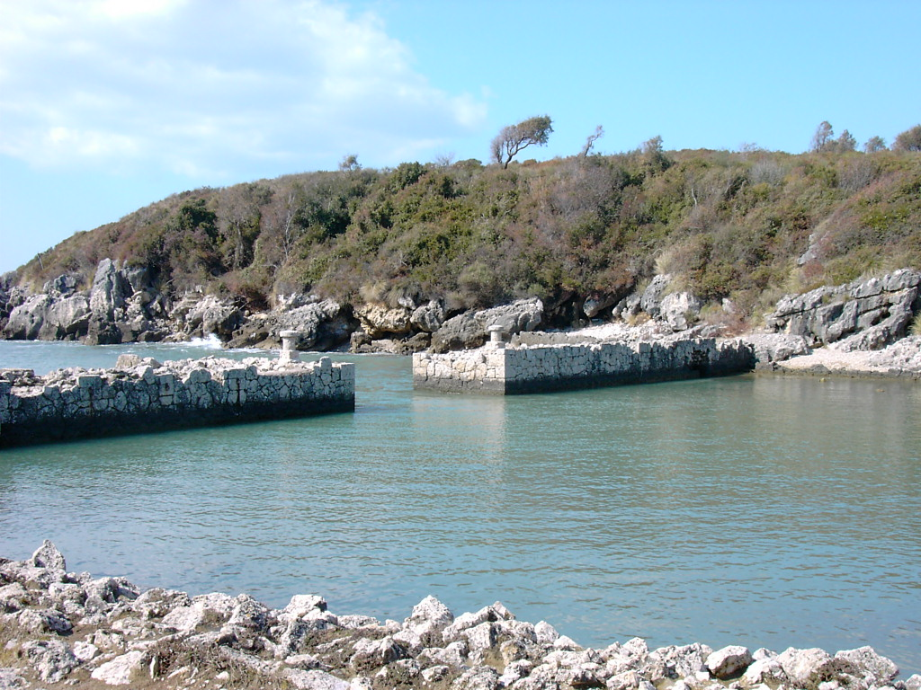 Mare, Formia, Lazio, Italy.